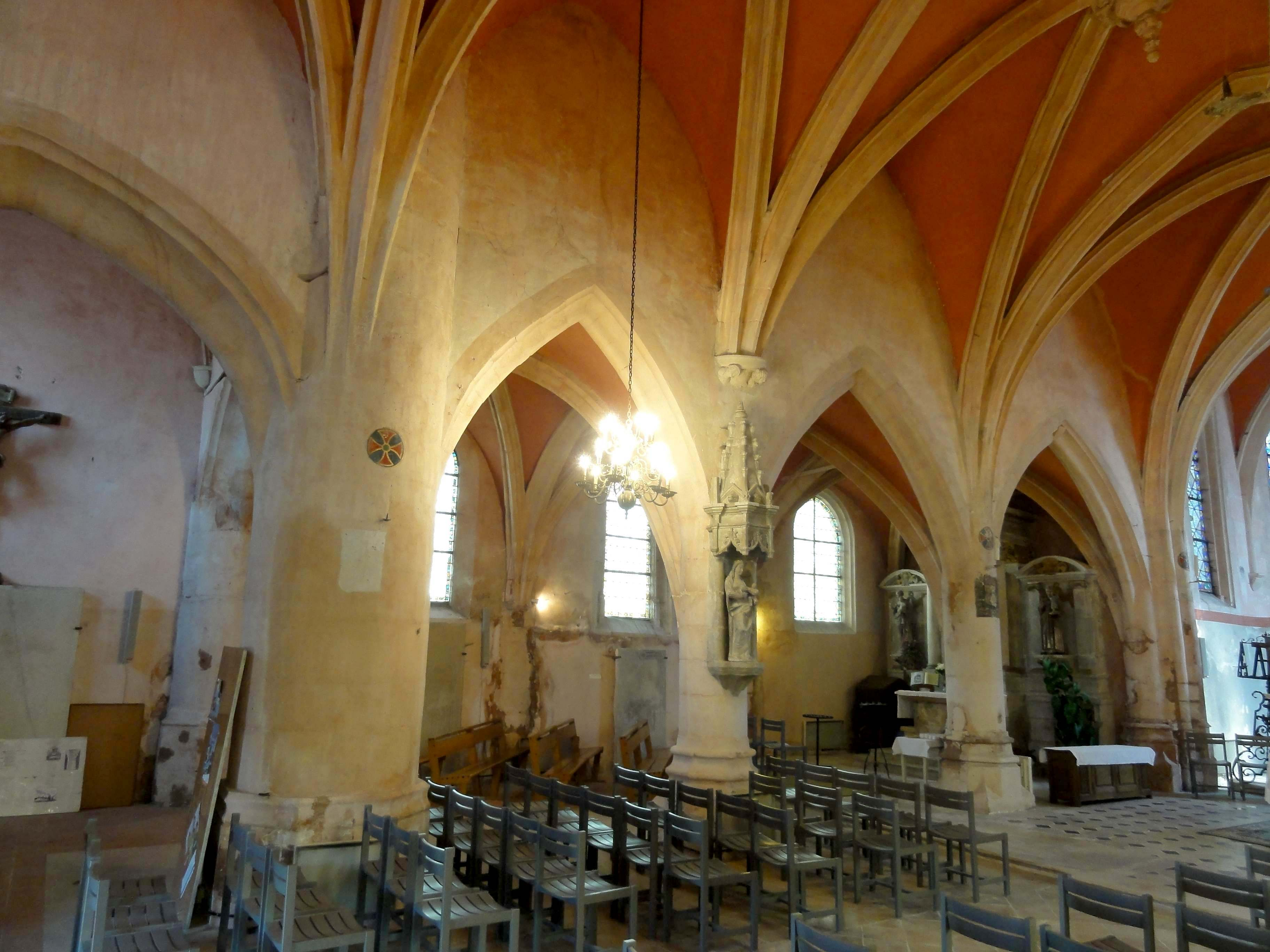 Intérieur de l'église - voir titre.